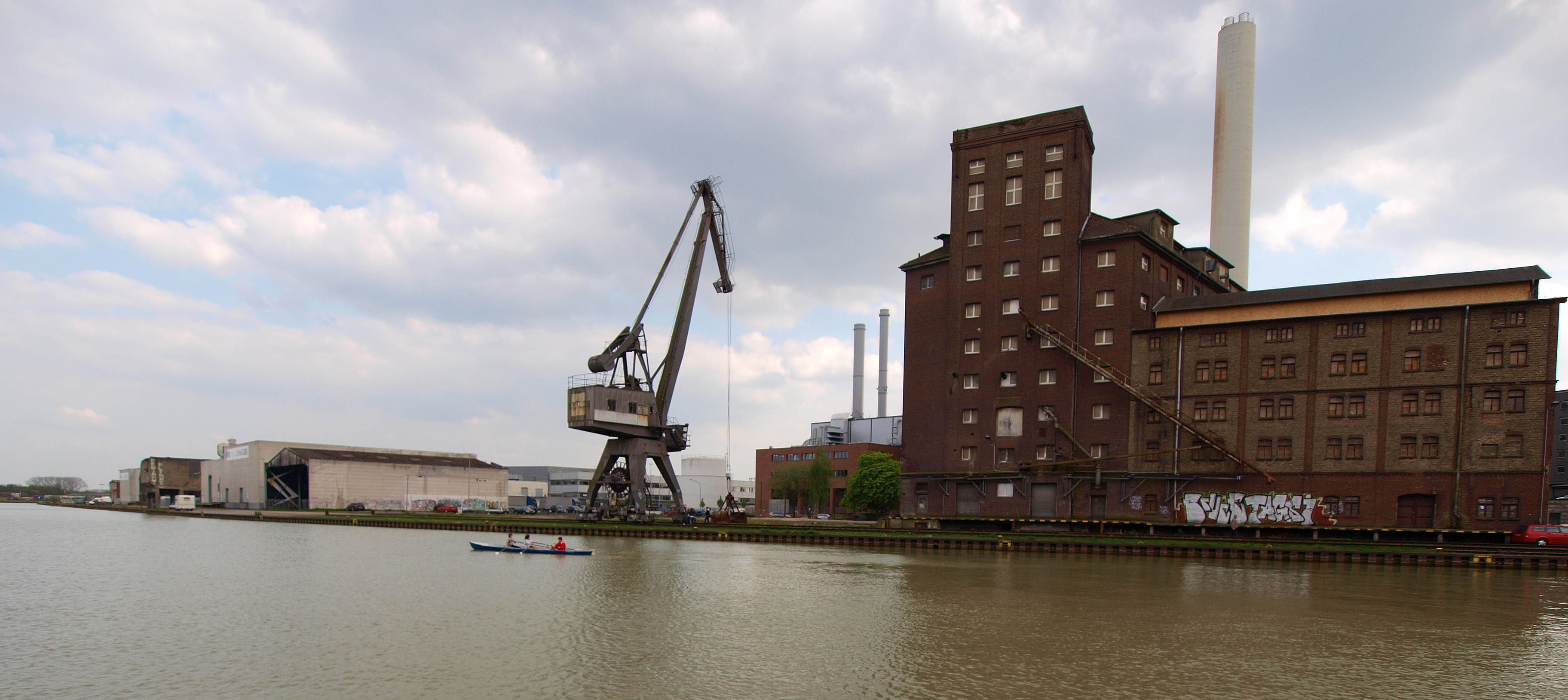 Flechtheimspeicher im Hafen Münster